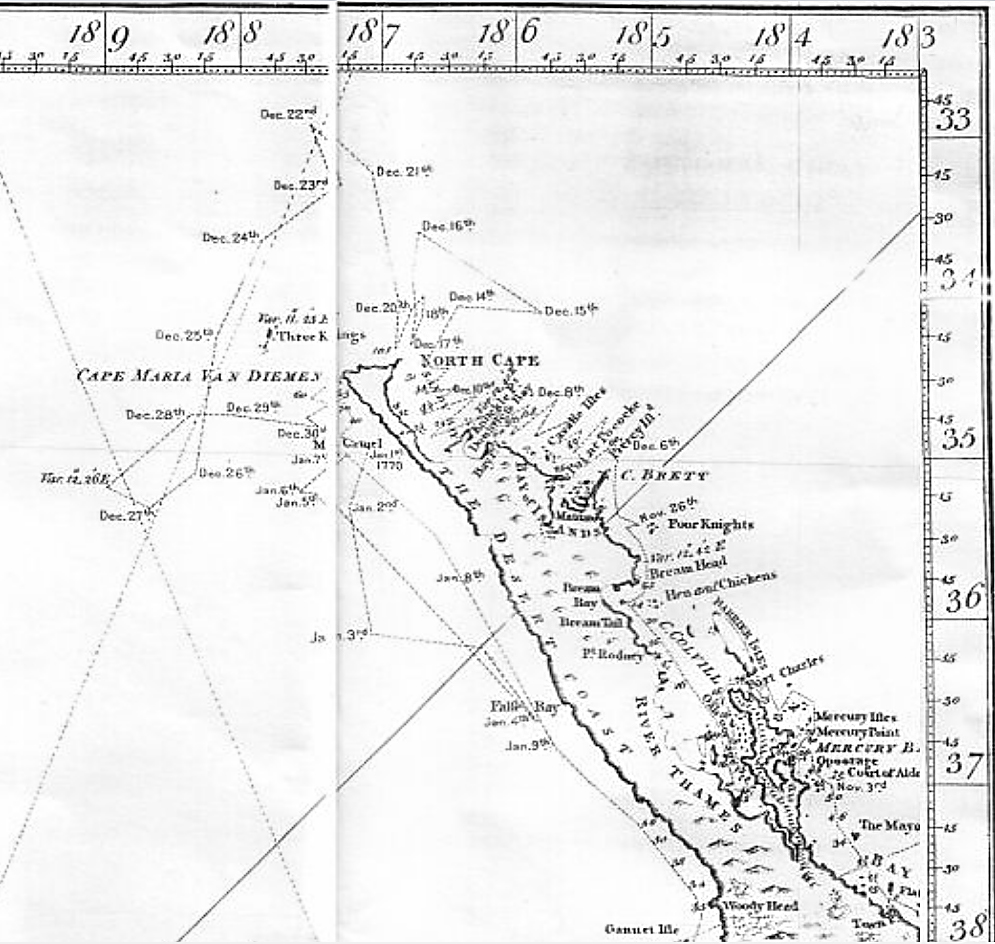 Ruta del HMB Endeavour por el extremo norte de la Isla Norte de Nueva Zelanda y el paso del cabo Norte y del cabo Maria van Diemen. Fragmento del grabado de John Bayly del mapa de Nueva Zelanda realizado por James Cook e Isaac Smith, 1769-70, publicado en la edición oficial de los diarios por John Hawkeswh en 1773.